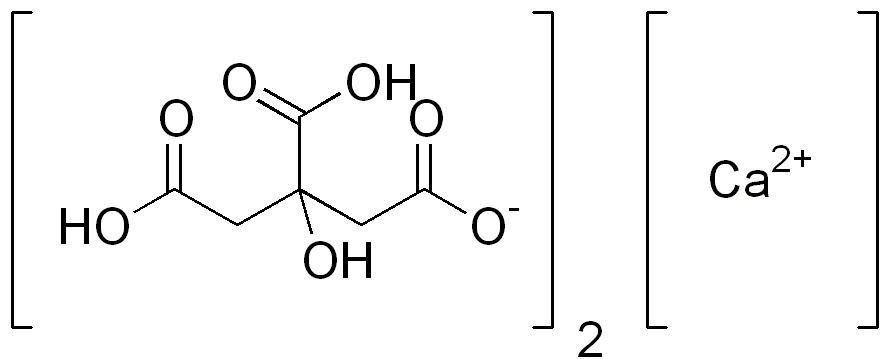 chemical structure of monocalcium citrate